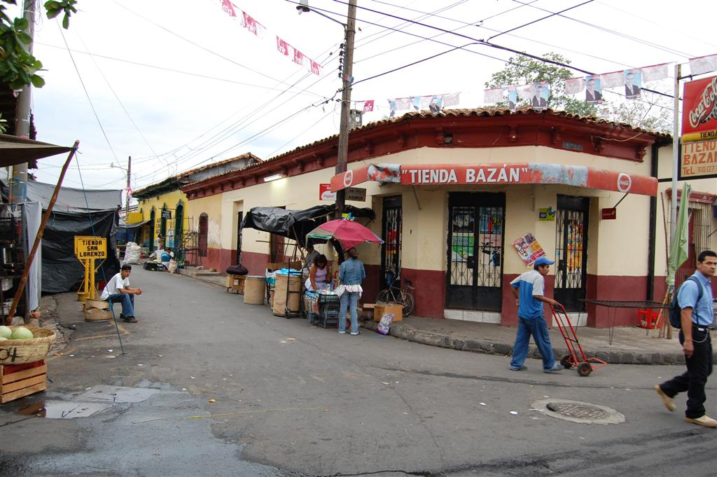 Tienda Bazan